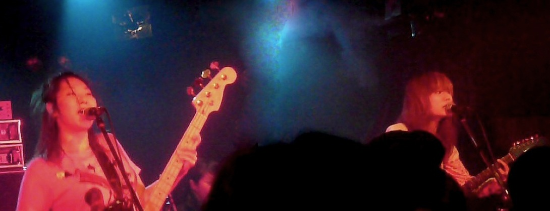 つしまみれのライブ、2008年 (Tsu Shi Ma Mi Re concert, 2008)